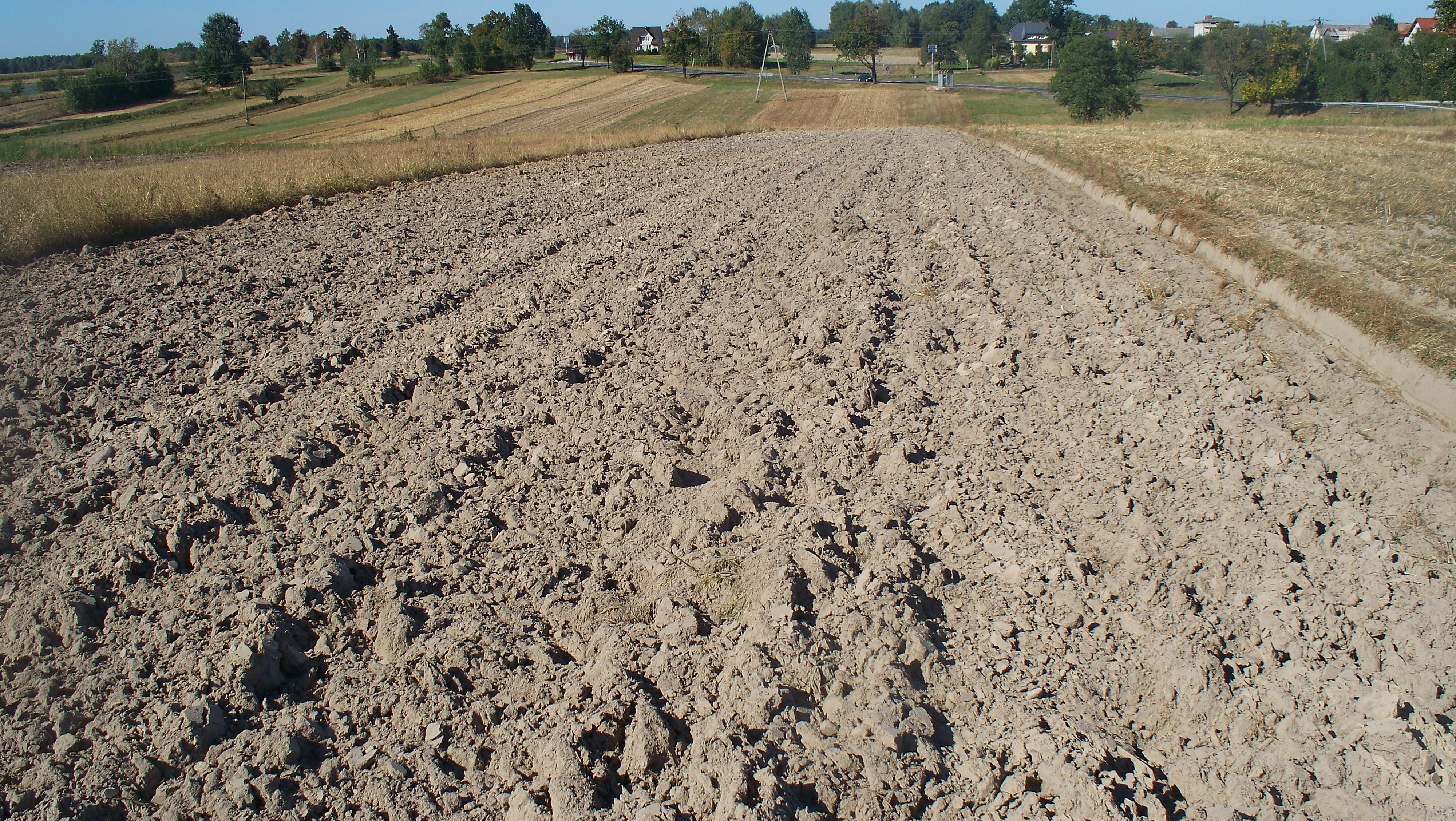 Orkę siewną stosuje się pod rośliny ozime, w tym przypadku pod zboża.